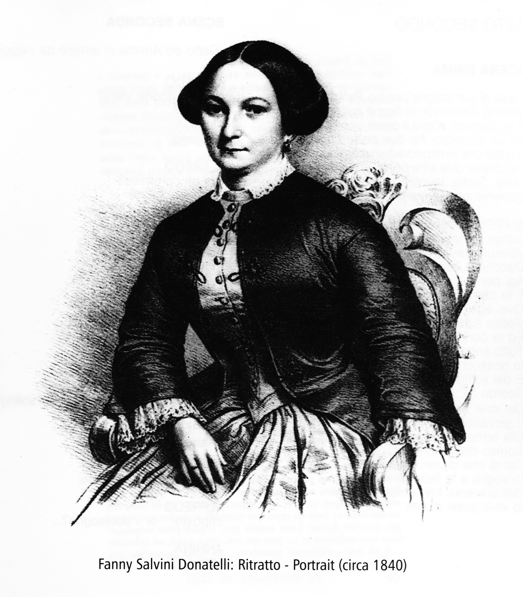 photographie du portrait de Fanny Salvini Donatelli, créatrice du rôle de Violetta, à la Fenice de Venise